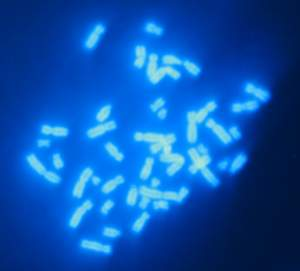 Chromosoom preparaat